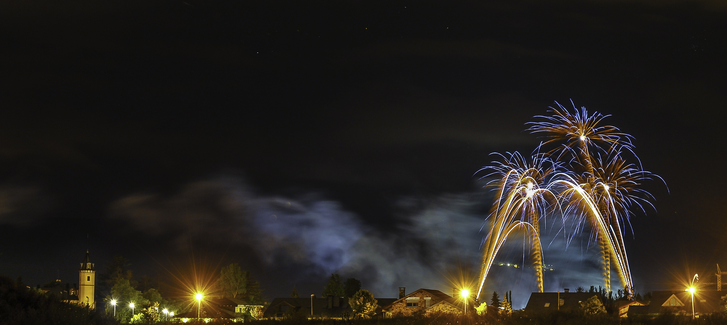 Focs d'artifici de la festa de l'Estany